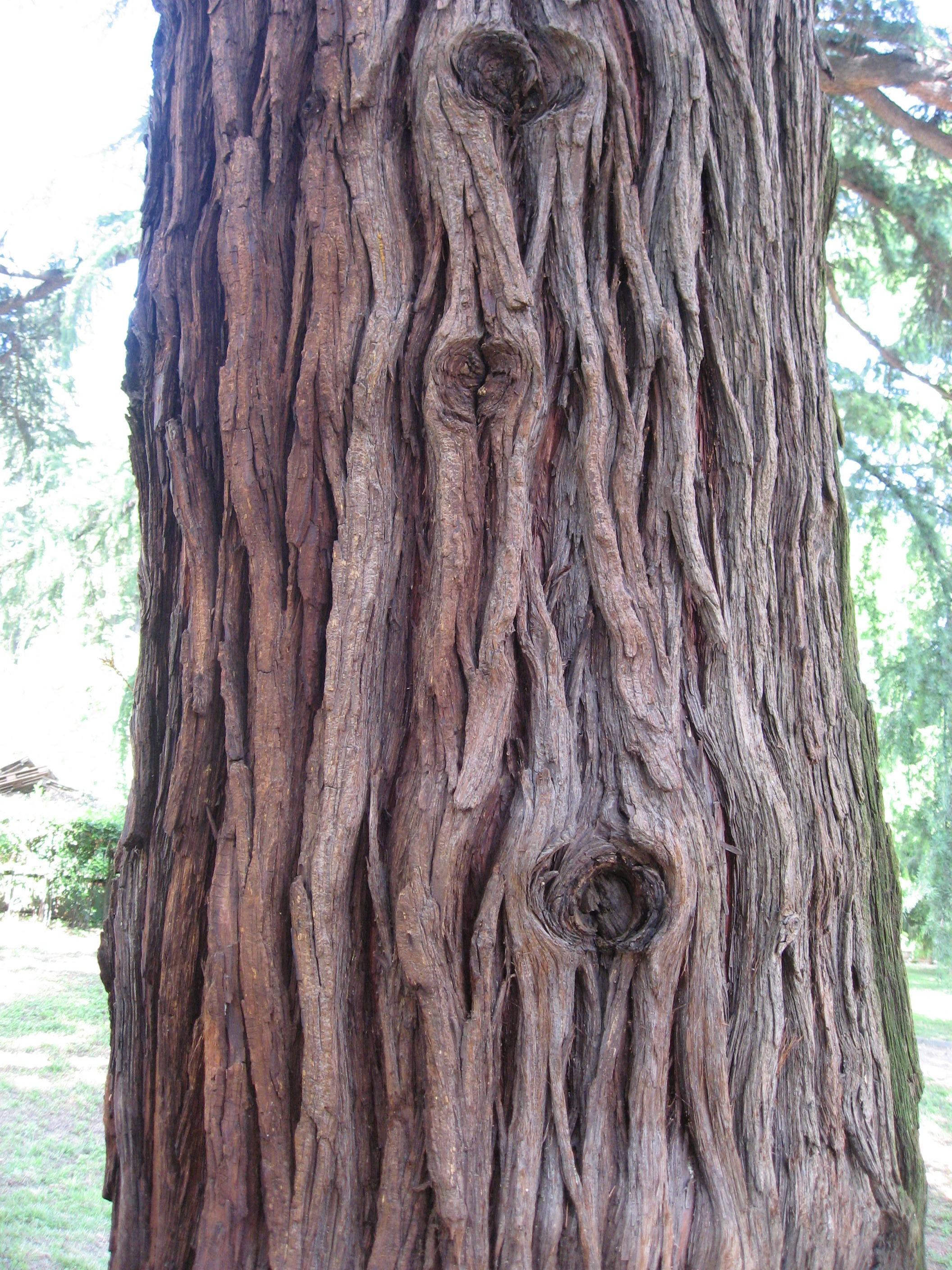 Calocedrus decurrens trunc in Giardino dei Semplici di Firenze Map: 43° 46' 45" N 11° 15' 39" E